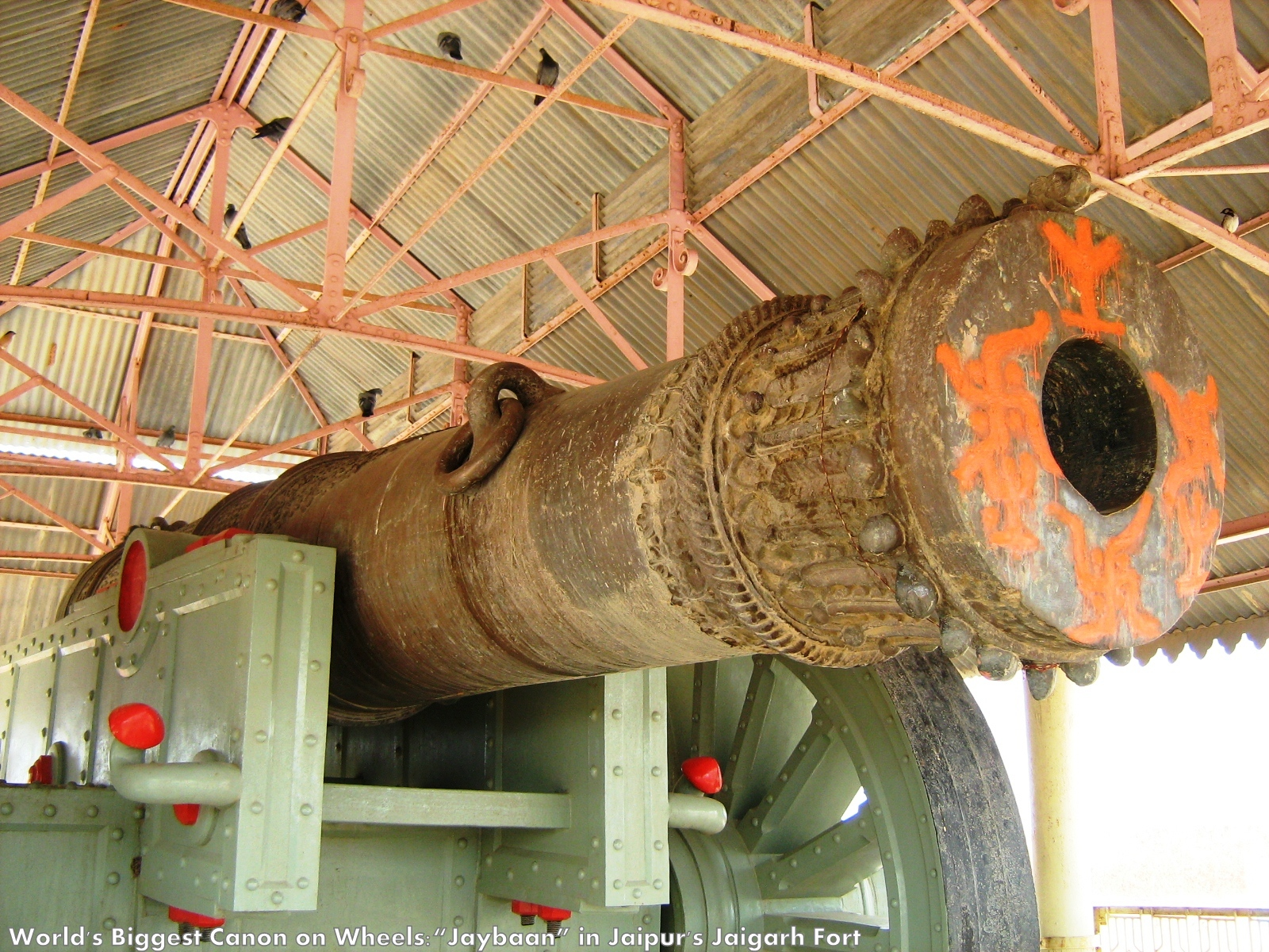 जयगढ़ किले में ढाली गयी तोप जयबाण जिसका परीक्षण केवल एक बार हुआ